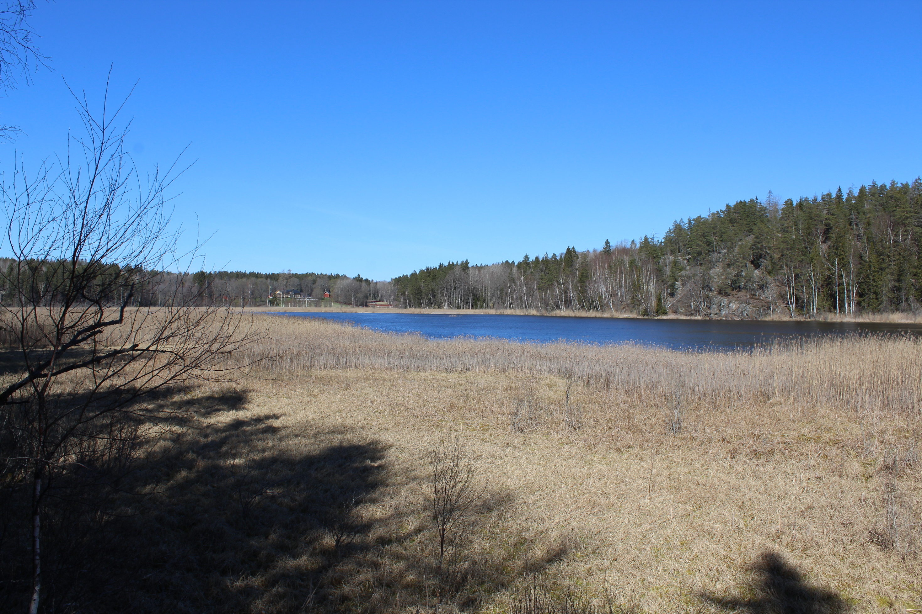 Vädersjön, Södermanland